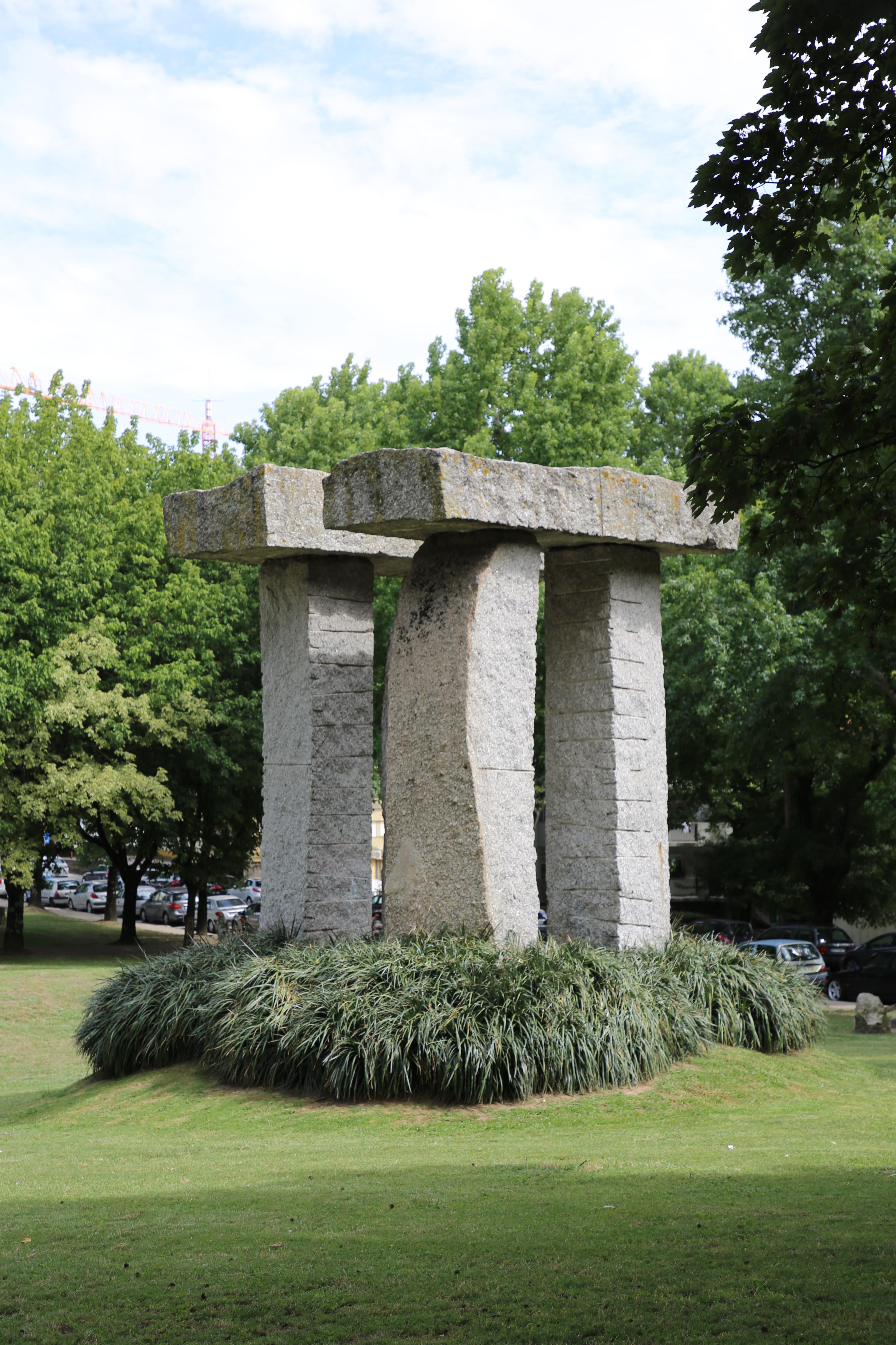 Porto, Portugal - 91 - S/Título - Minoru Niizuma - 1985 - Jardim Paulo Vallada